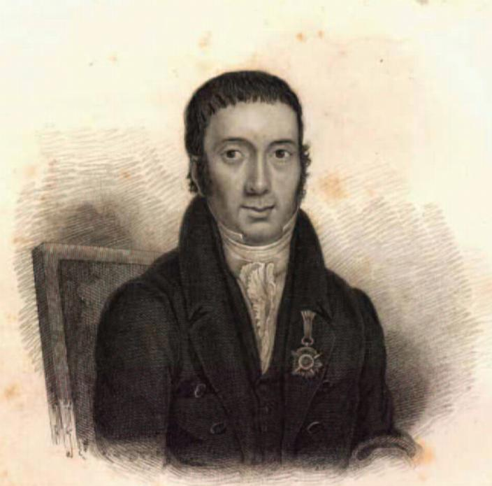 uan Egaña Risco (Lima, 31 de octubre de 1769 - Santiago, 20 de abril de 1836) fue un político, jurista y escritor chileno-peruano1 2 de gran prestigio en los primeros años de la República de Chile, redactor de la Constitución de 1823.